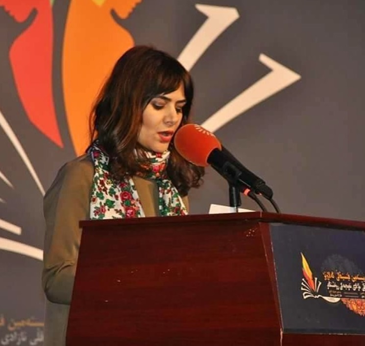 نویسنده